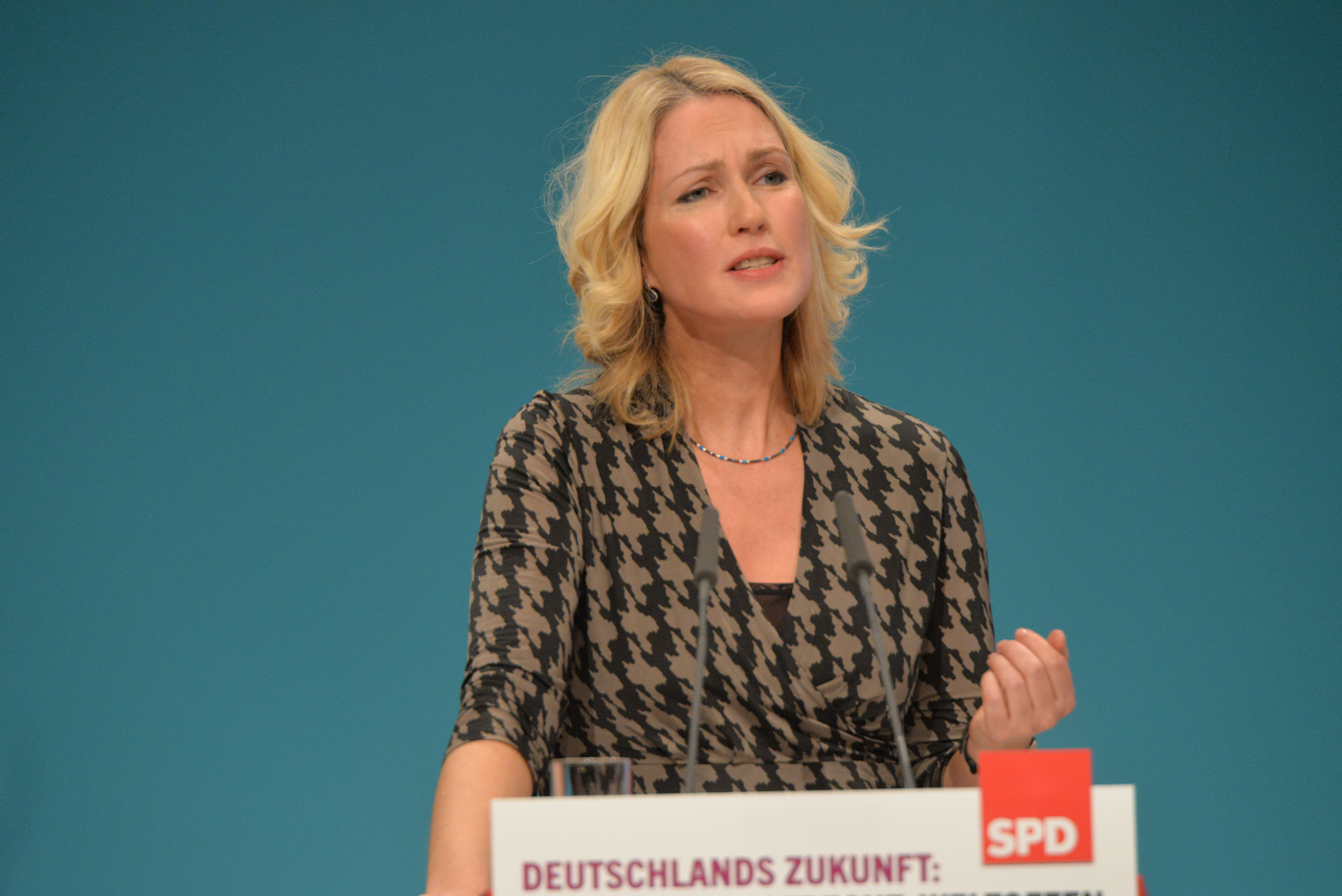 SPD Bundesparteitag Berlin, 10.-12. Dezember 2015, CityCube, Messe Berlin